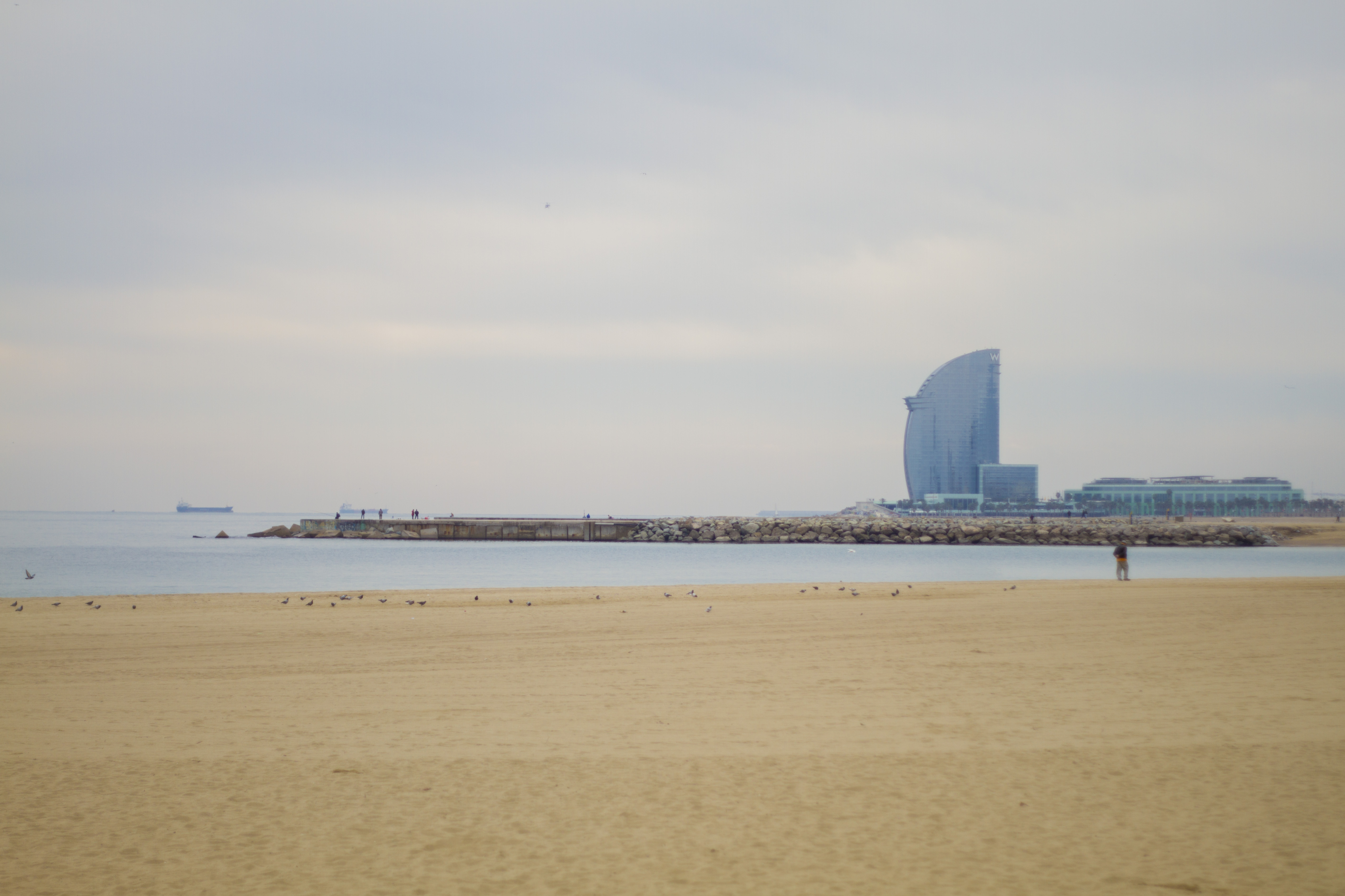 Playa de la Barceloneta en invierno